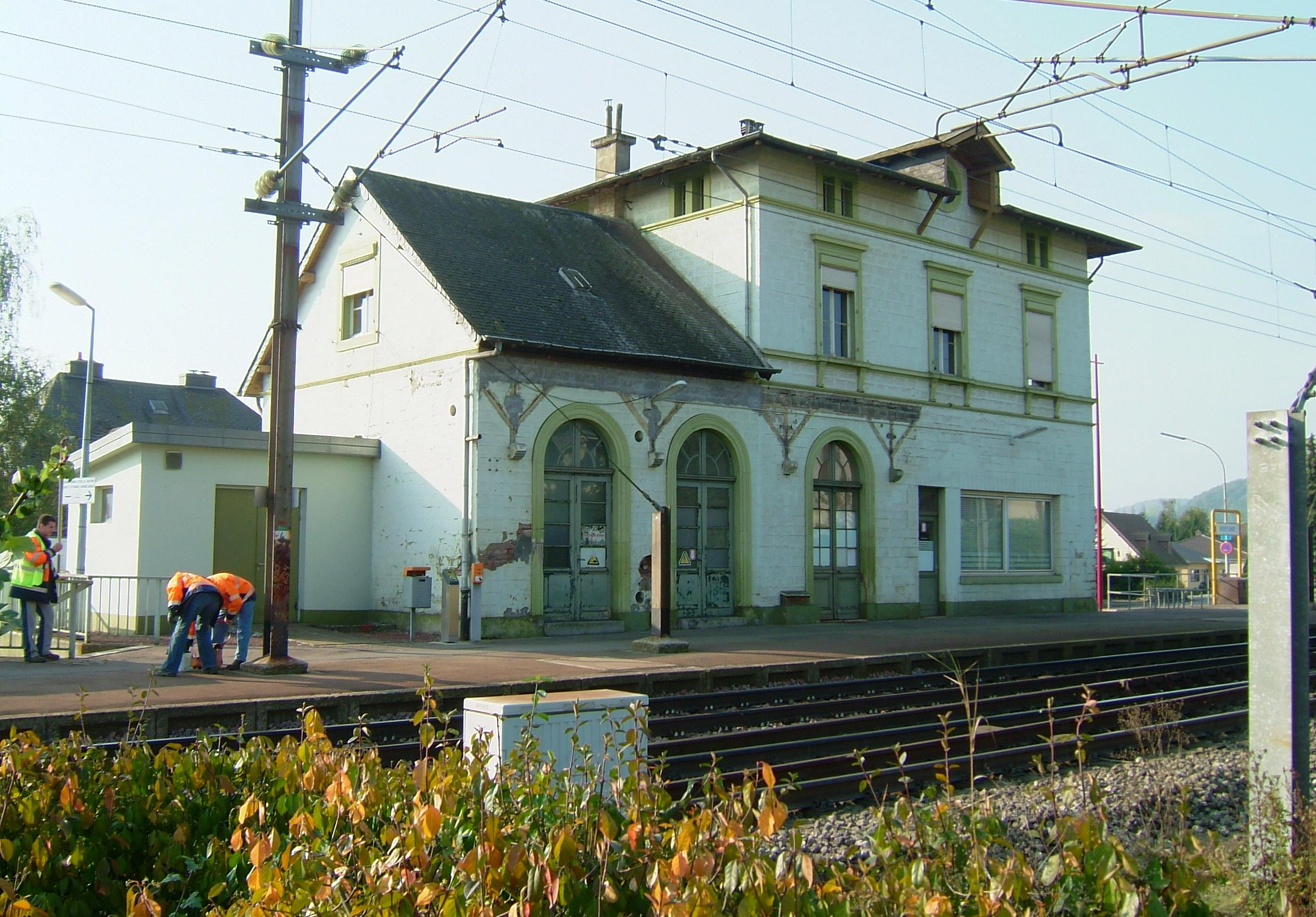 Gare Näerzeng, 2003 op der Lëscht vun de klasséierte Monumenter als Nationalmonument klasséiert.